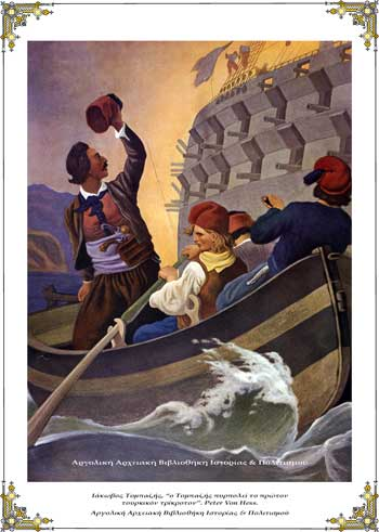 Ιάκωβος Τομπαζής, «ο Τομπαζής πυρπολεί το πρώτον τουρκικόν τρίκροτον»